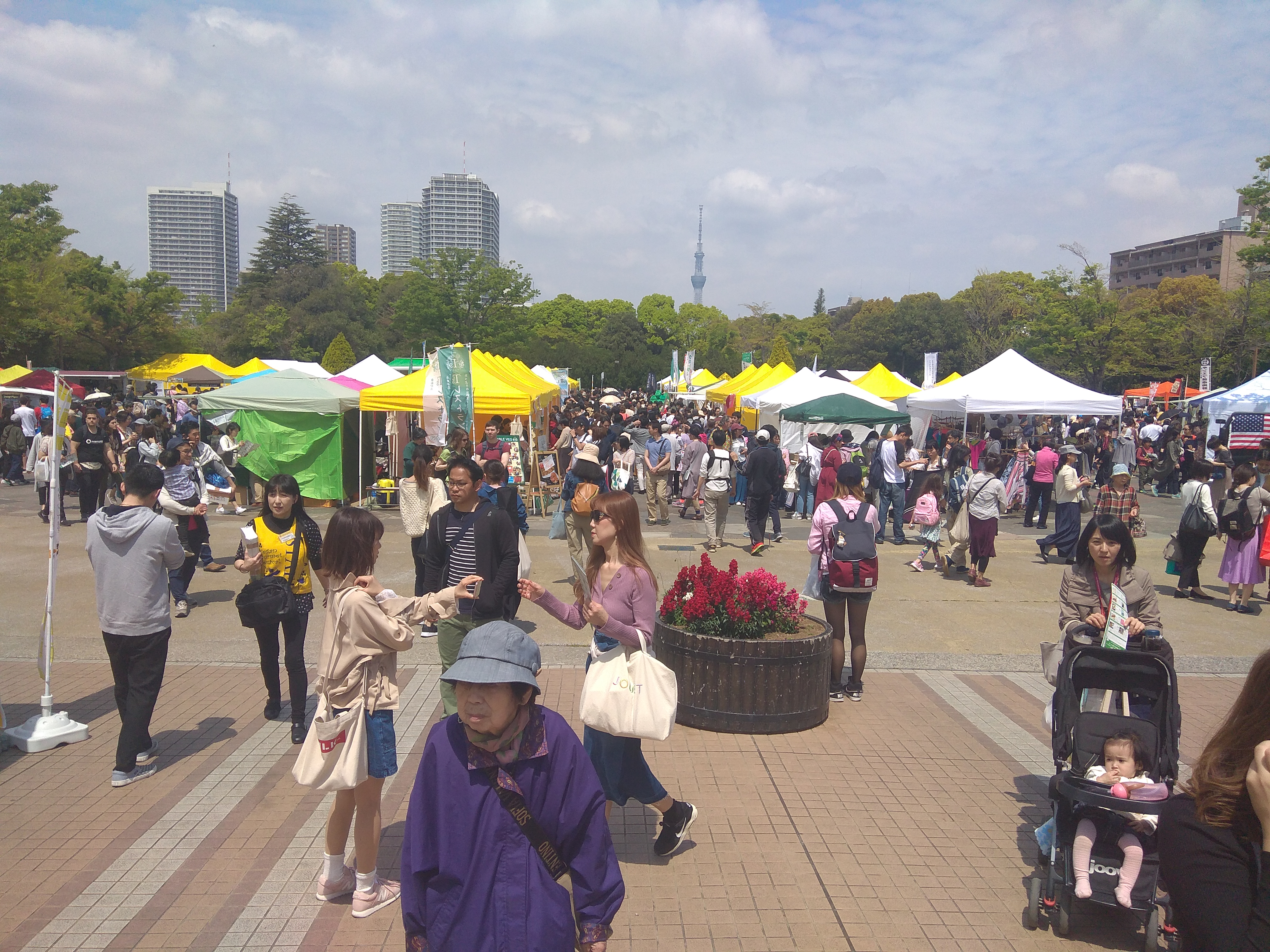 木場公園で行われた菜食グルメ祭。